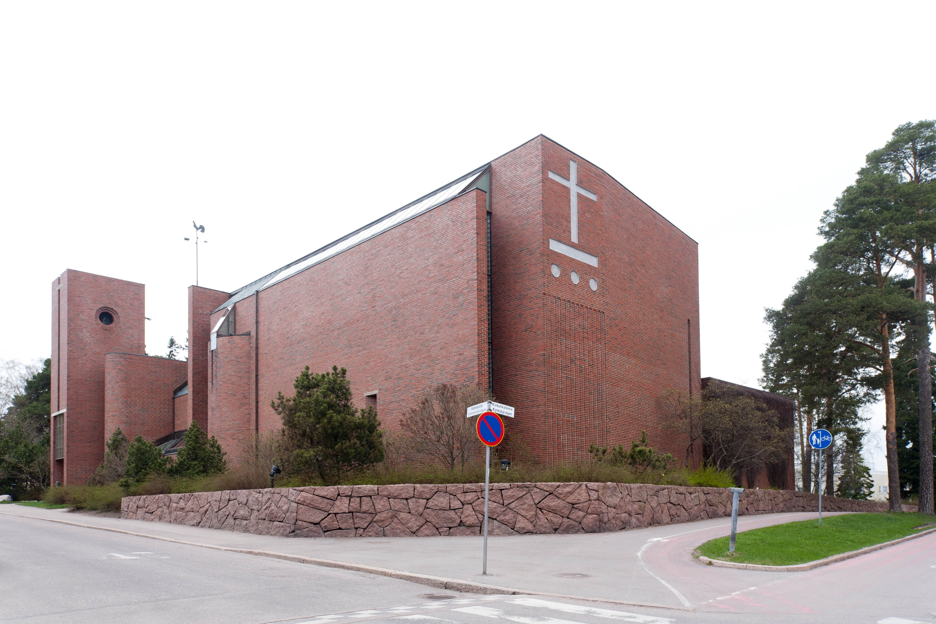 Malmi, Helsinki. Kristian Gullichsen, 1981. Malmi Church in Helsinki, Finland. Architect: Kristian Gullichsen, 1981.